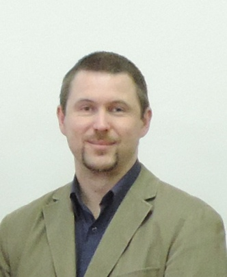 Peter Baláž, slovaka esperantisto kaj LKK-ano de Universala Kongreso de Esperanto 2016. Foto devenas de la kunsido de la LKK en Nitra en la 17-a de Januaro 2015